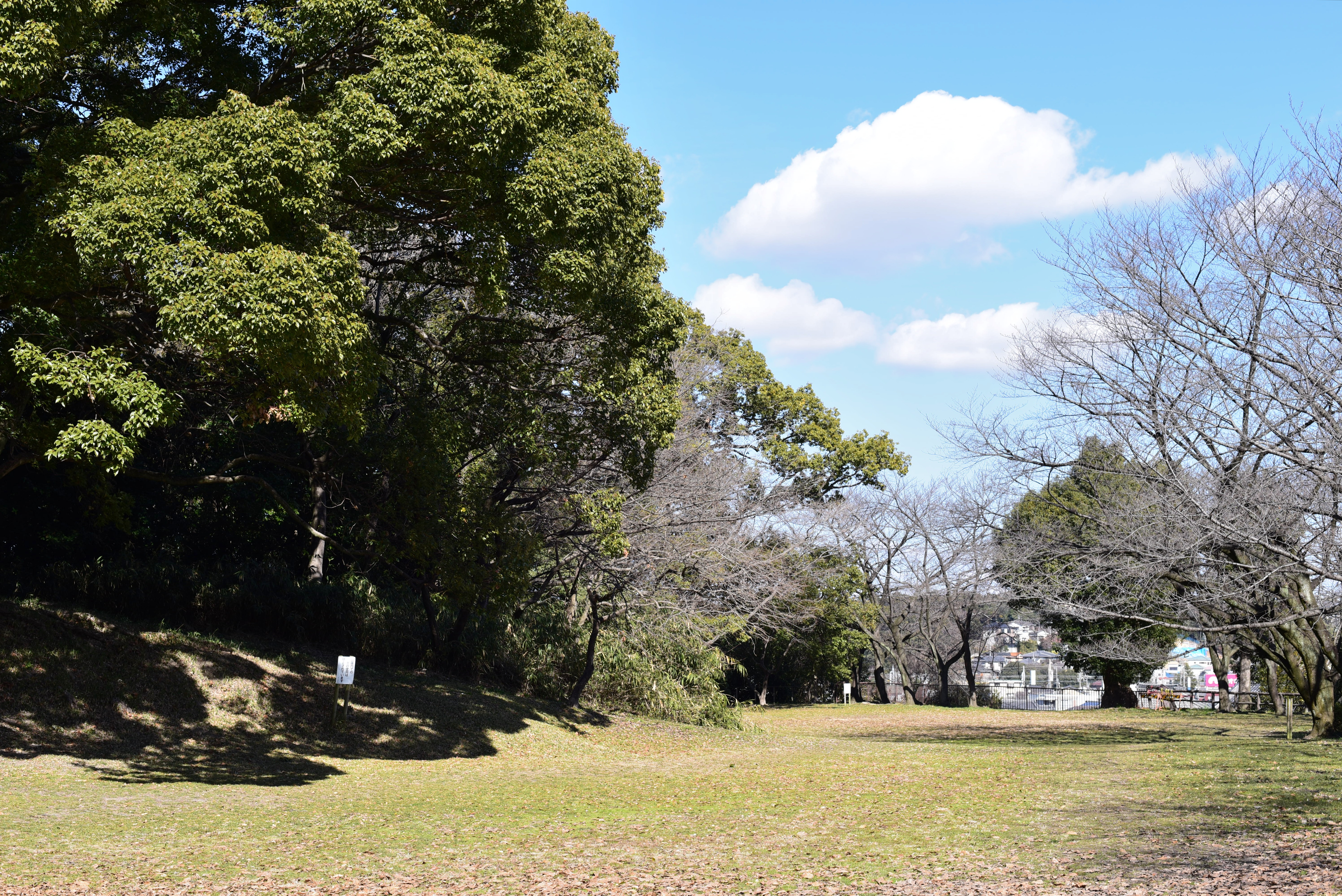 大高城の本丸跡